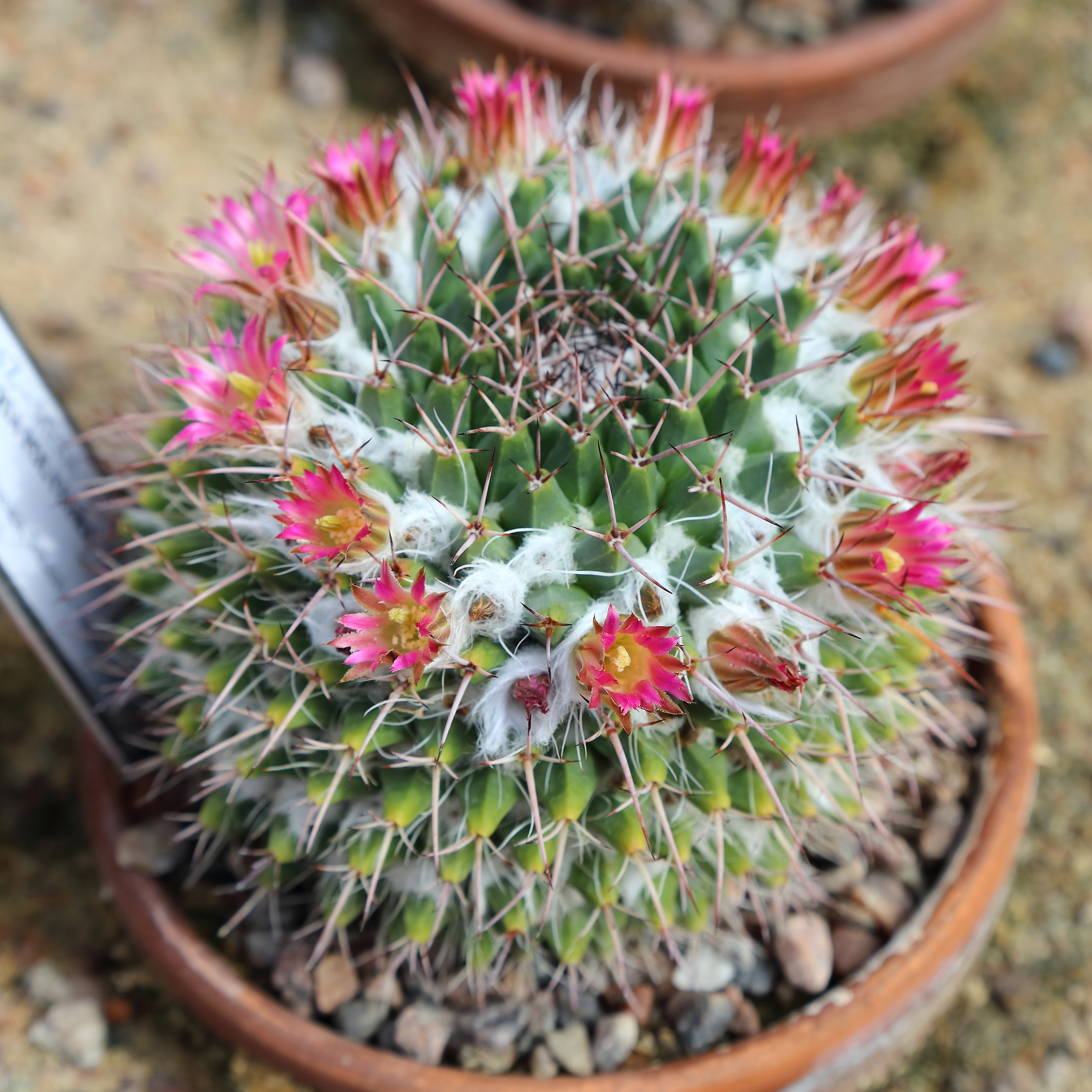 Mammillaria polyedra identifierad med hjälp av skylt i Göteborgs botaniska trädgård.